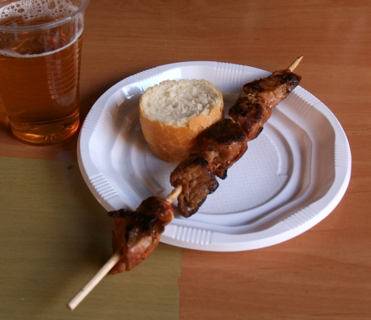 Pincho moruno - (Tapa de la feria de Valladolid - Fiestas de San Lorenzo - 2009)